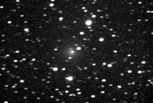 comète schaumasse